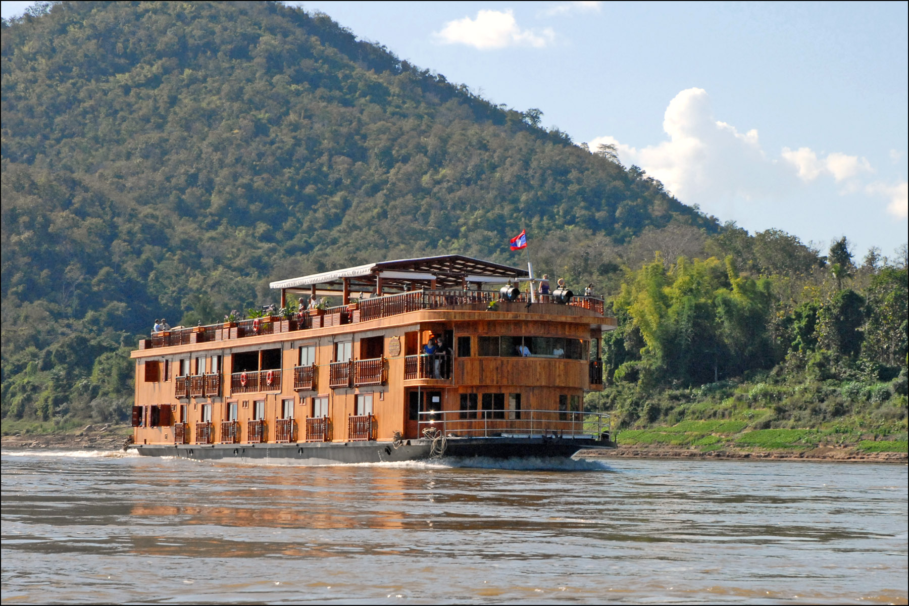 Bâteau de croisière sur le Mékong